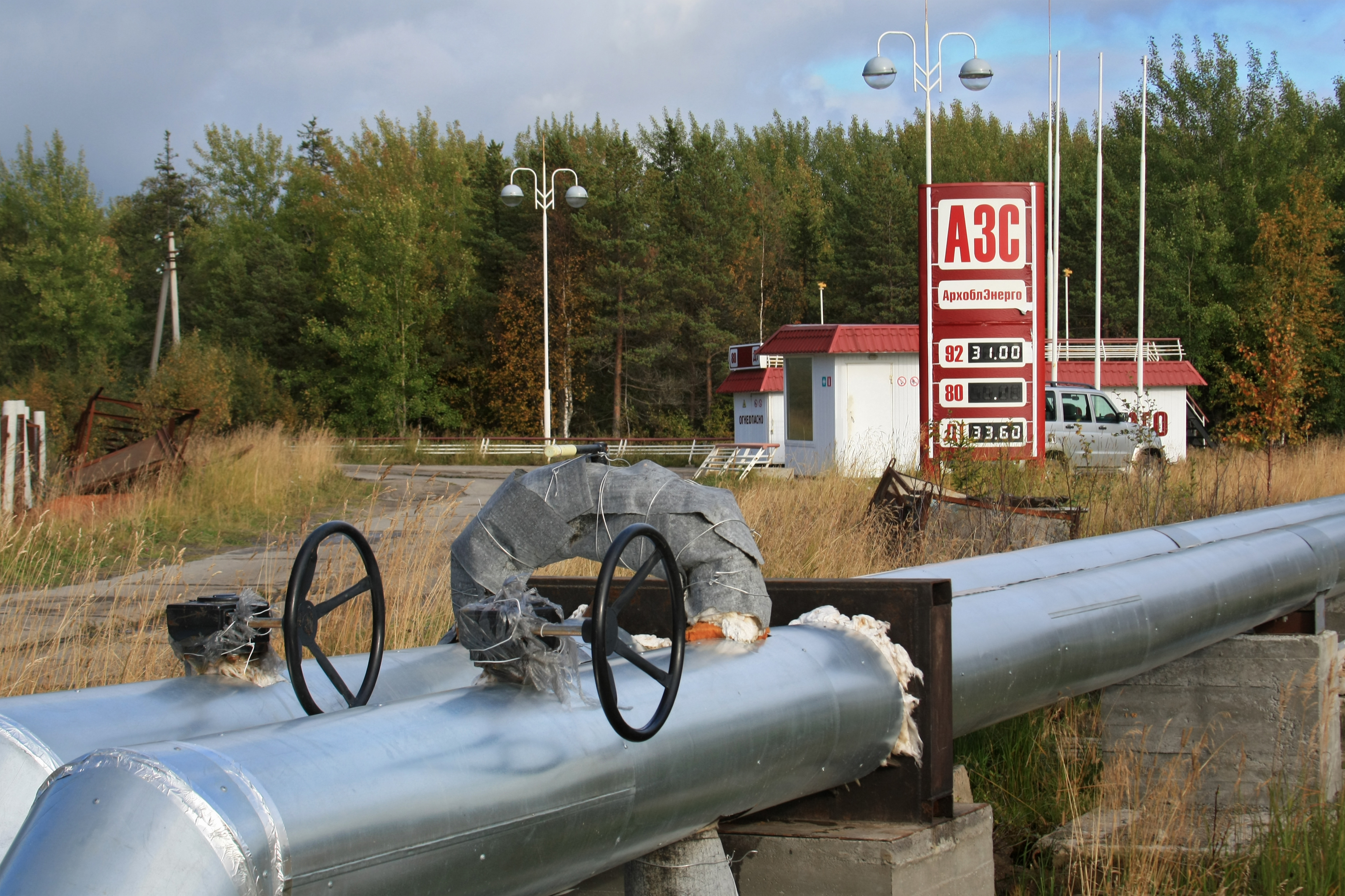 Kütusetoru Solovetsi diielelekrtijaama